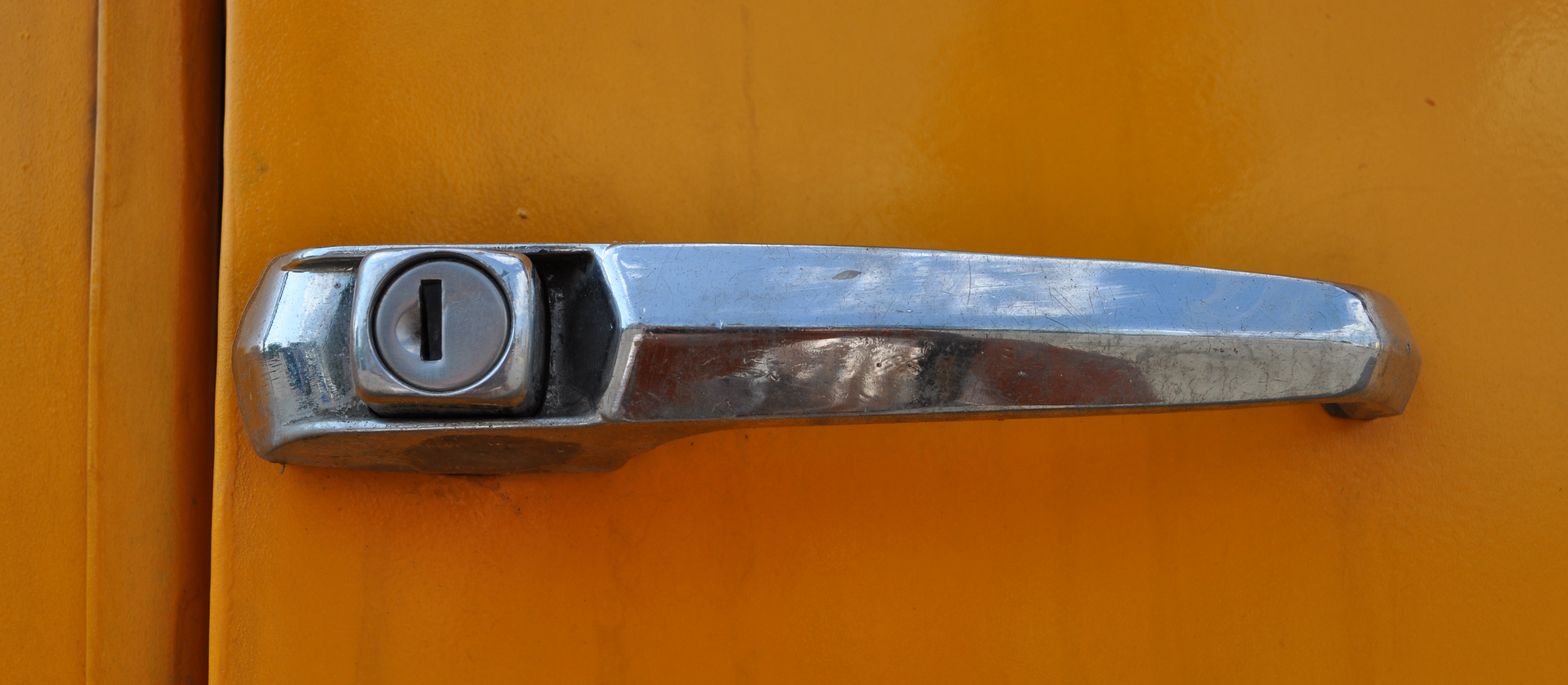 Jelcz 080. Klamka. Zdjęcie wykonane dzięki uprzejmości Adama Zylbertala z Klubu Sympatyków Transportu Miejskiego z Wrocławia. jelcz080.pl